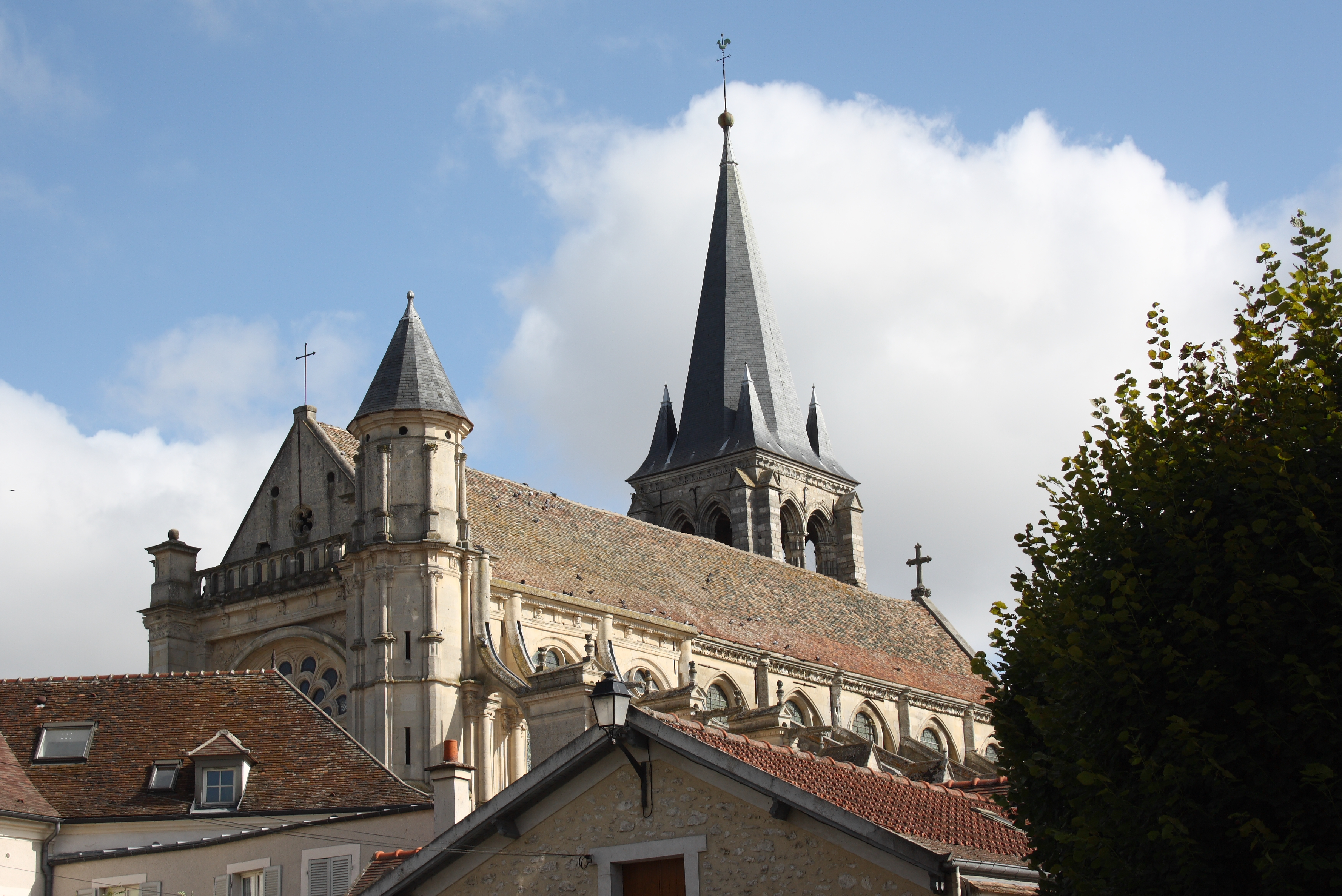 Katholische Pfarrkirche Saint-Étienne in Brie-Comte-Robert im Département Seine-et-Marne in der Region Île-de-France (Frankreich) Object location48° 41′ 25.08″ N, 2° 36′ 30.6″ E